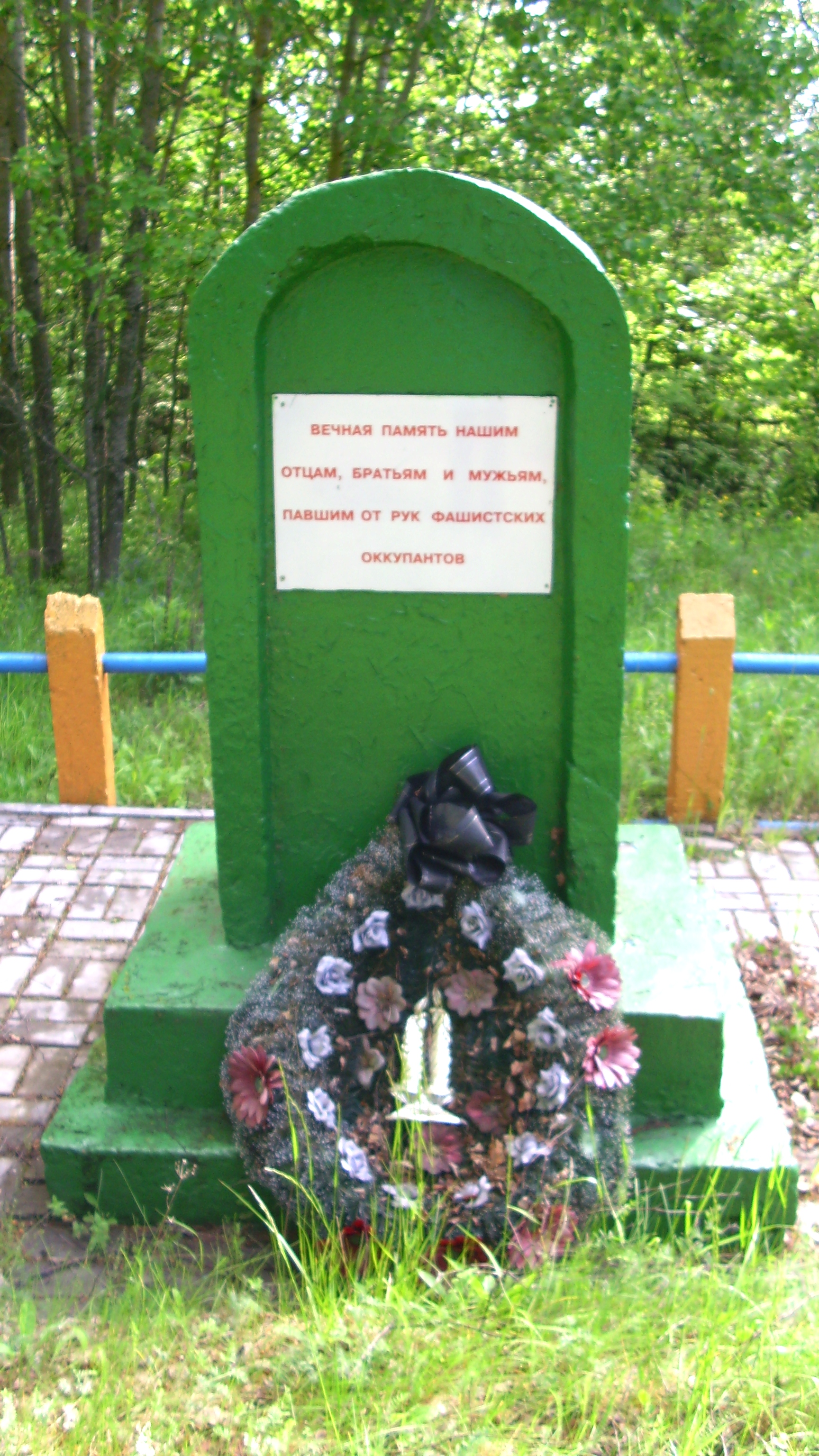 Памятник убитым во время Холокоста евреям у деревни Ягеловщизна Жупранского сельсовета Ошмянского района в урочище Люговщина (или Бартели). Установлен в 1958 году.